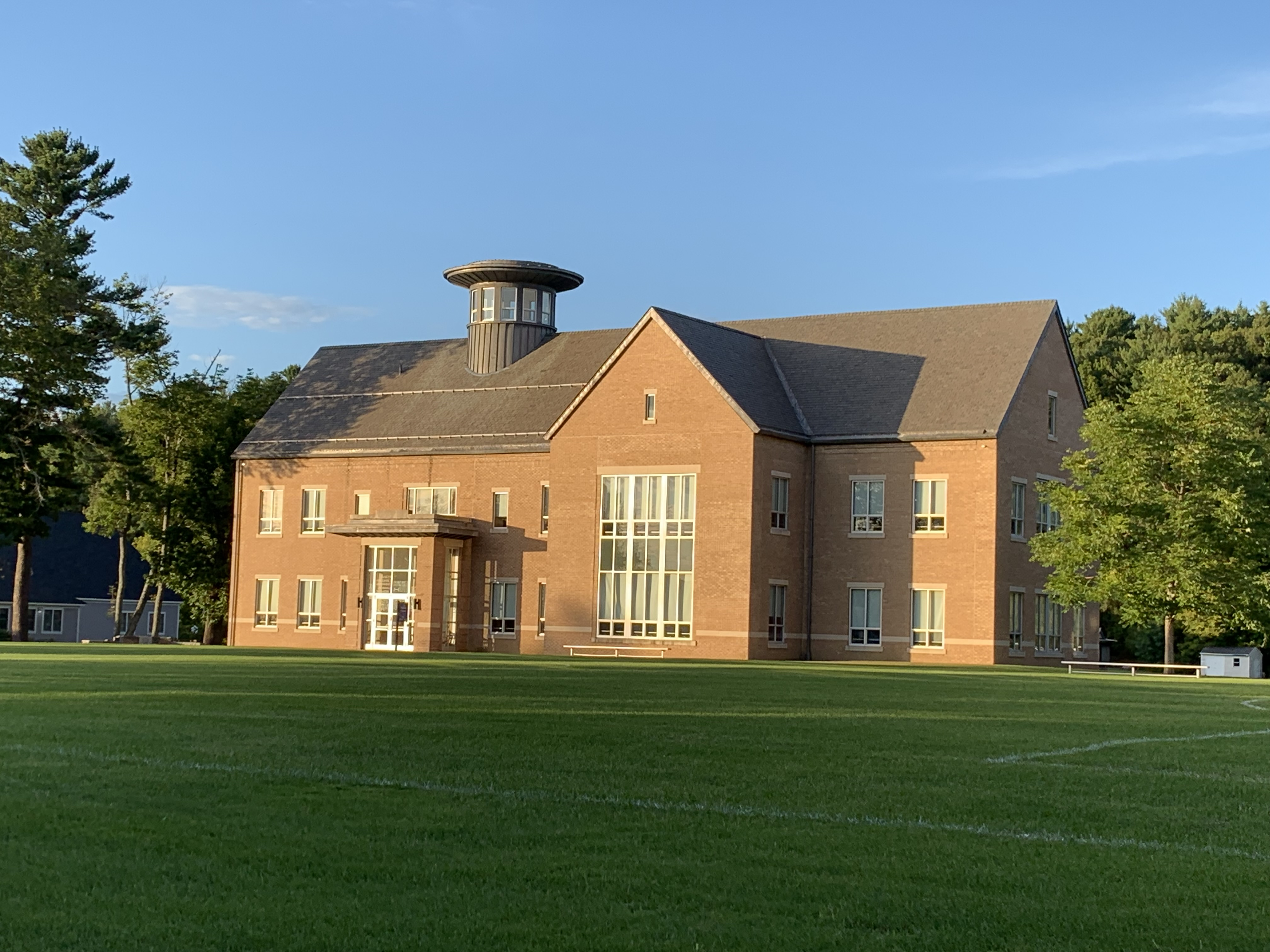 Jackson Library (shadow), Berwick Academy, South Berwick, Maine